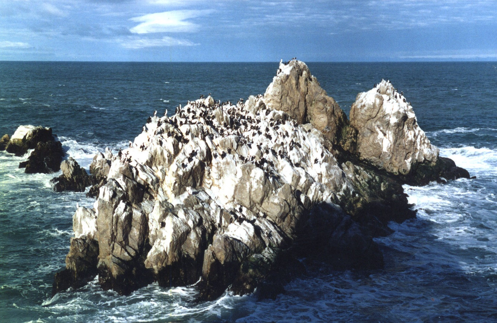 Vista de una cormoranera de Cabo Blanco (Argentina, foto del año 2000)